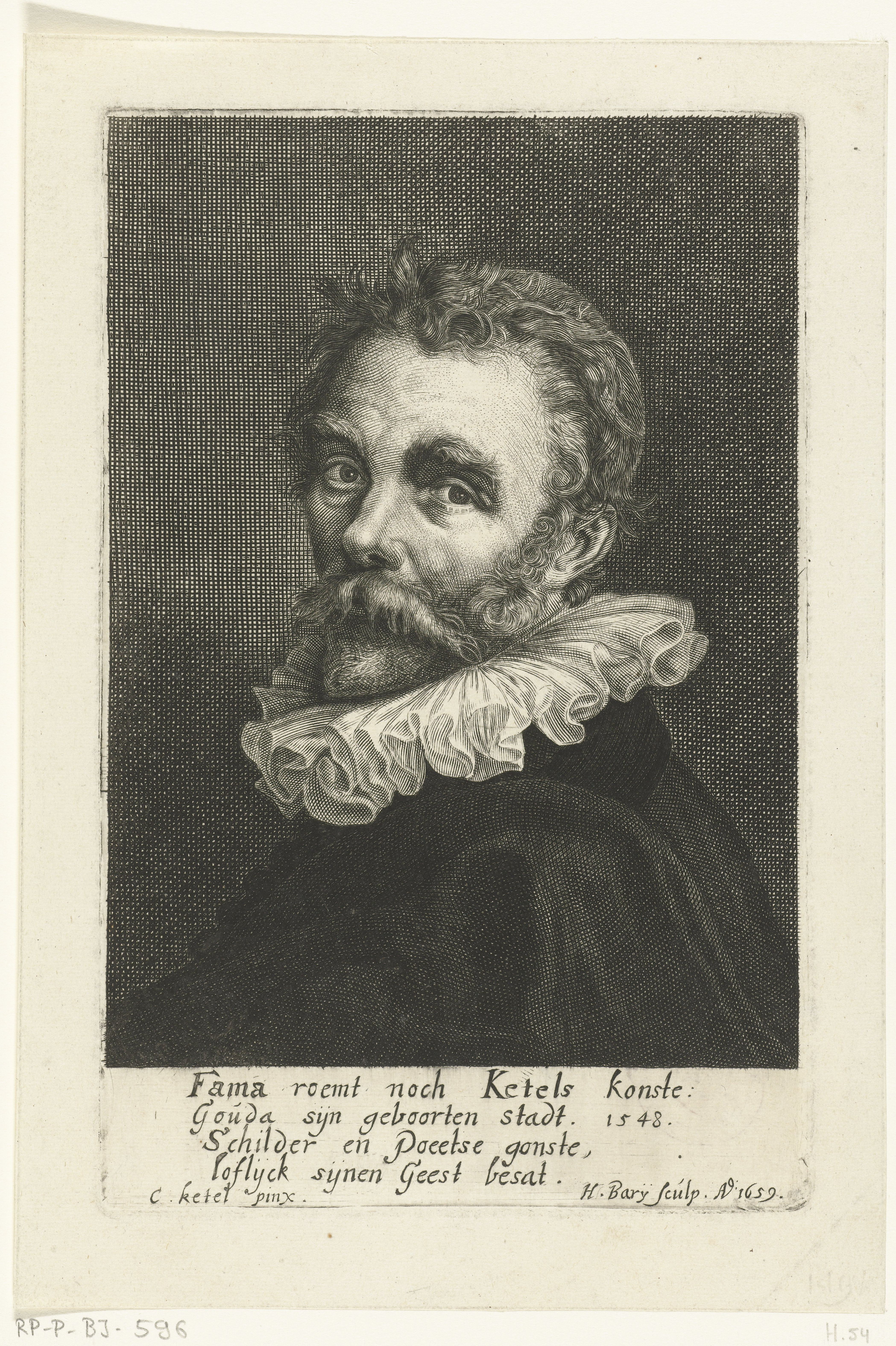 IdentificatieTitel(s): Portret van Cornelis KetelObjecttype: prent Objectnummer: RP-P-BI-596Catalogusreferentie: Hollstein Dutch 54Opschriften / Merken: verzamelaarsmerk, verso linksonder, gestempeld: Lugt 240Omschrijving: Borstbeeld van Cornelis Ketel met een vers van vier regels op Ketel in het Nederlands.VervaardigingVervaardiger: prentmaker: Hendrik Bary (vermeld op object)naar schilderij van: Cornelis Ketel (vermeld op object)Plaats vervaardiging: NederlandDatering: 1659Fysieke kenmerken: gravureMateriaal: papier Techniek: graveren (drukprocedé)Afmetingen: plaatrand: h 215 mm × b 138 mmOnderwerpWie: Cornelis KetelVerwerving en rechtenVerwerving: overdracht van beheer 1816Copyright: Publiek domein